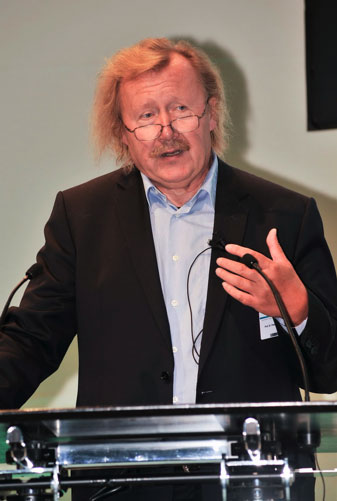 Peter Sloterdijk auf dem Radio Day 2009